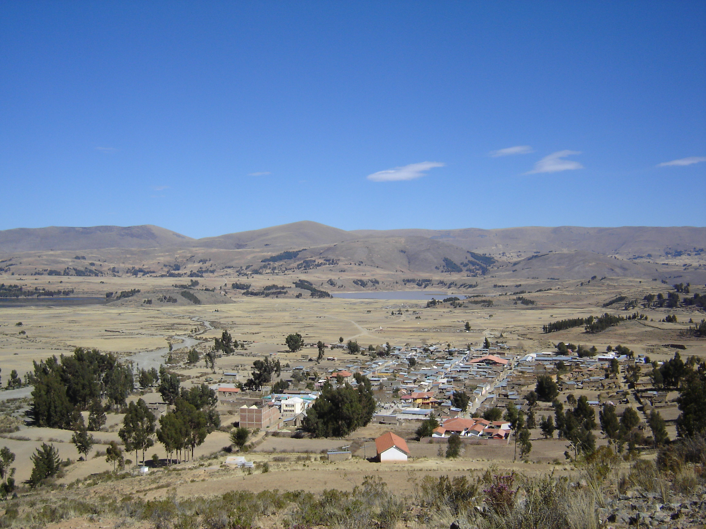 Una vista de la Población de Vacas, al fondo se puede apreciar dos de sus lagunas, al lado izquierdo parte de la laguna Pilawit'u y al centro la laguna Qullpaqucha.